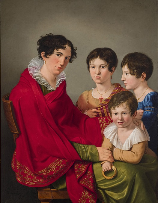 Marianna Cigola Balucanti con tre dei suoi figli, olio su tela, Museo Lechi, Montichiari